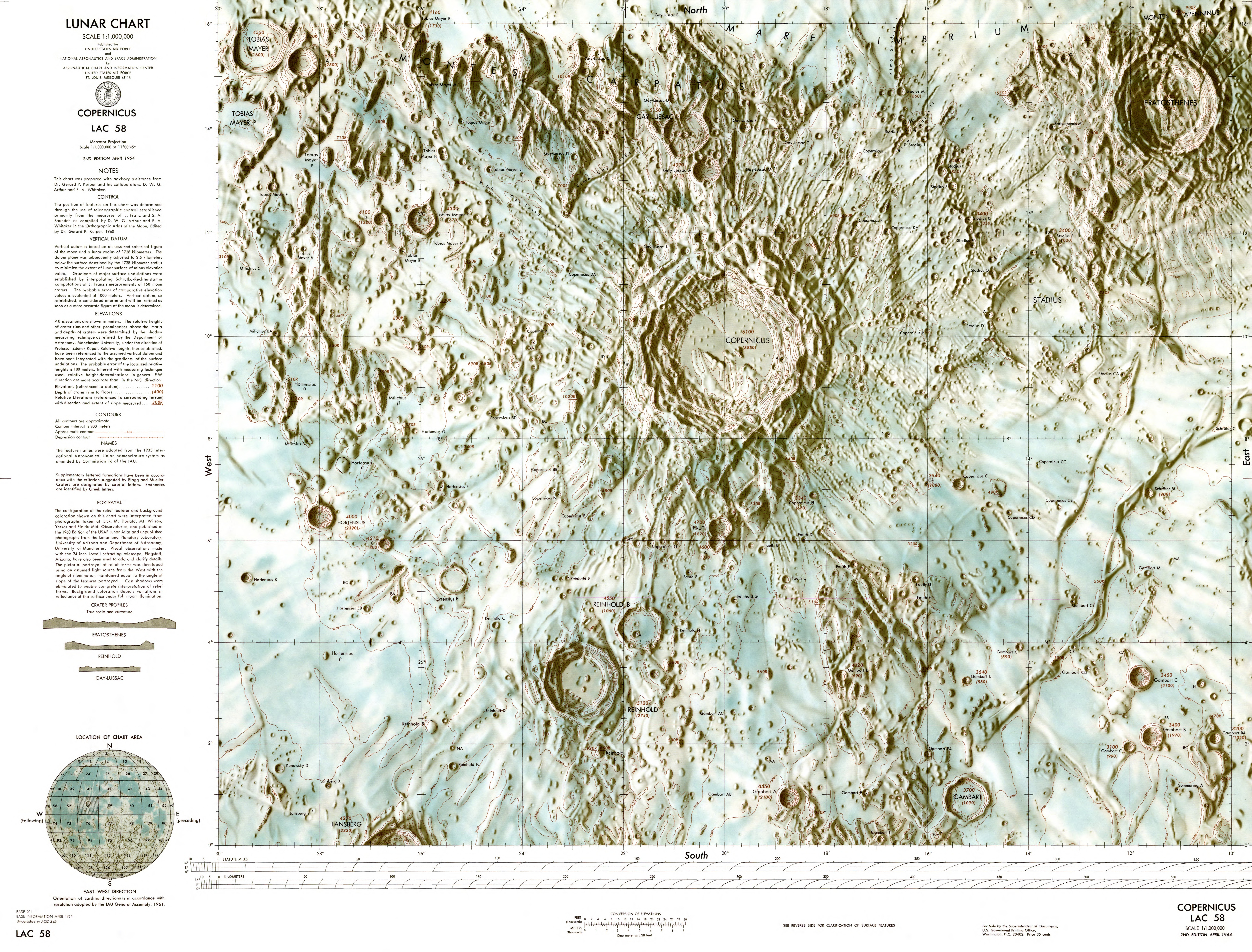 1:000 000 scale lunar chart - Copernicus (LAC 58)